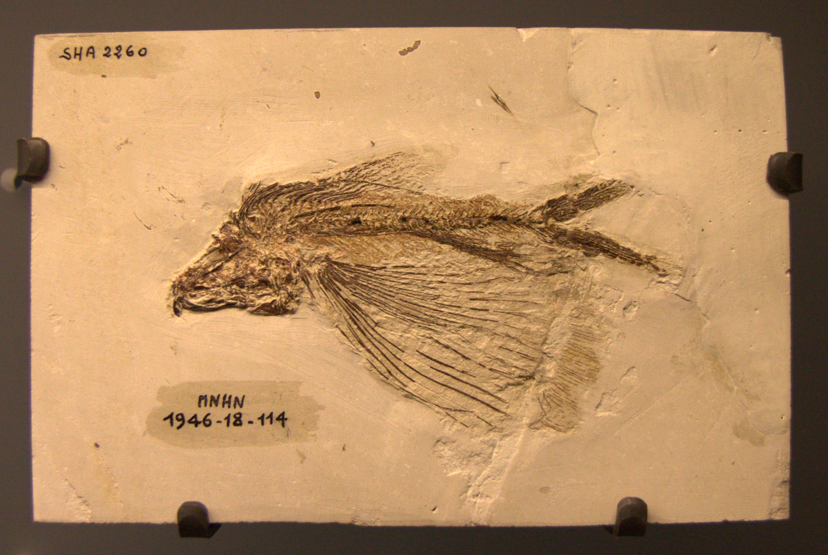 Cheirothrix, Daté d'environ 85 millions d'années, ce fossile a été découvert à Sahel Alma au Liban. The making of this document was supported by Wikimédia France. (Submit your project!)